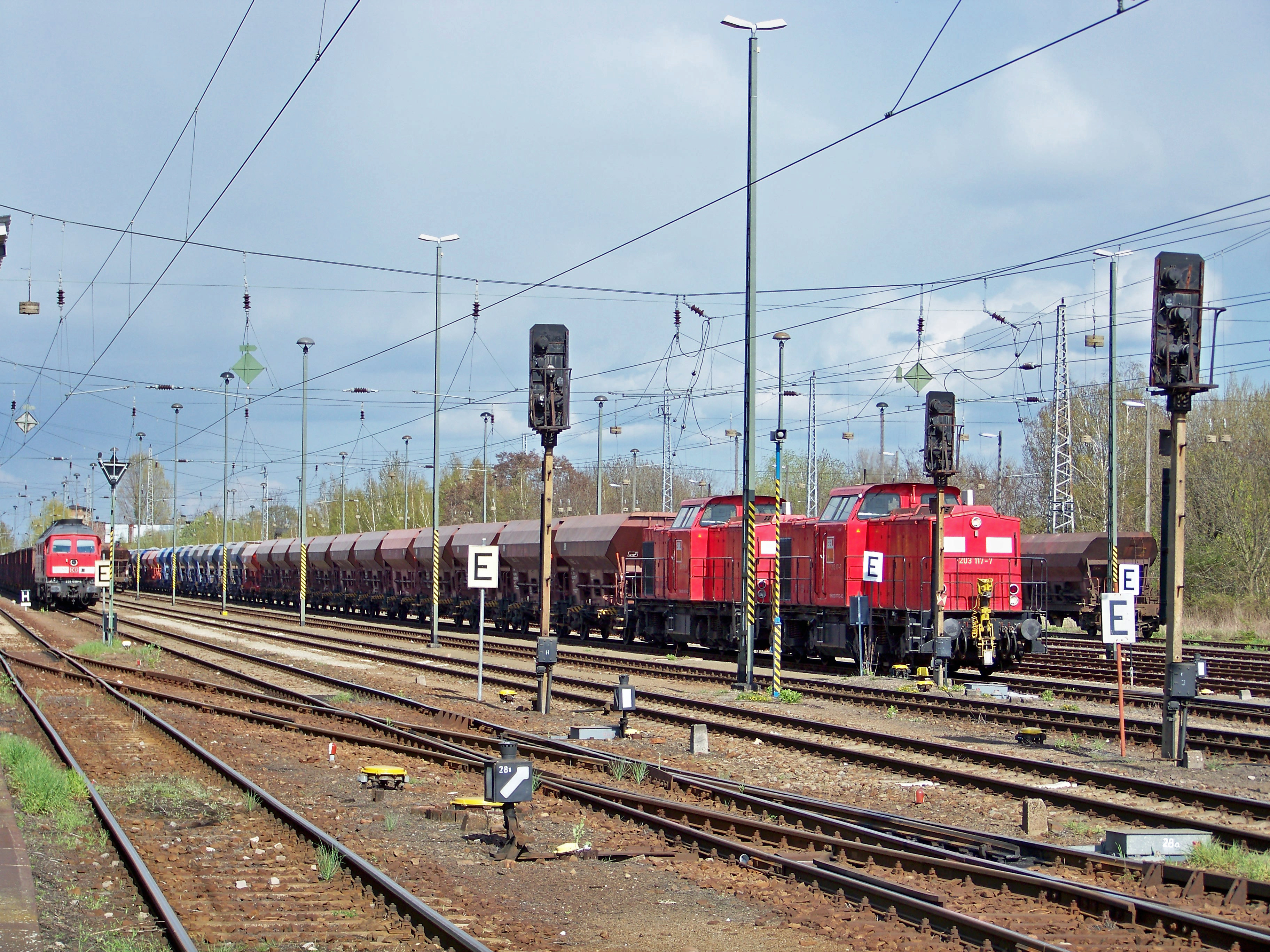 Güterbahnhof Eilenburg vom Personenbahnsteig 4 aus gesehen